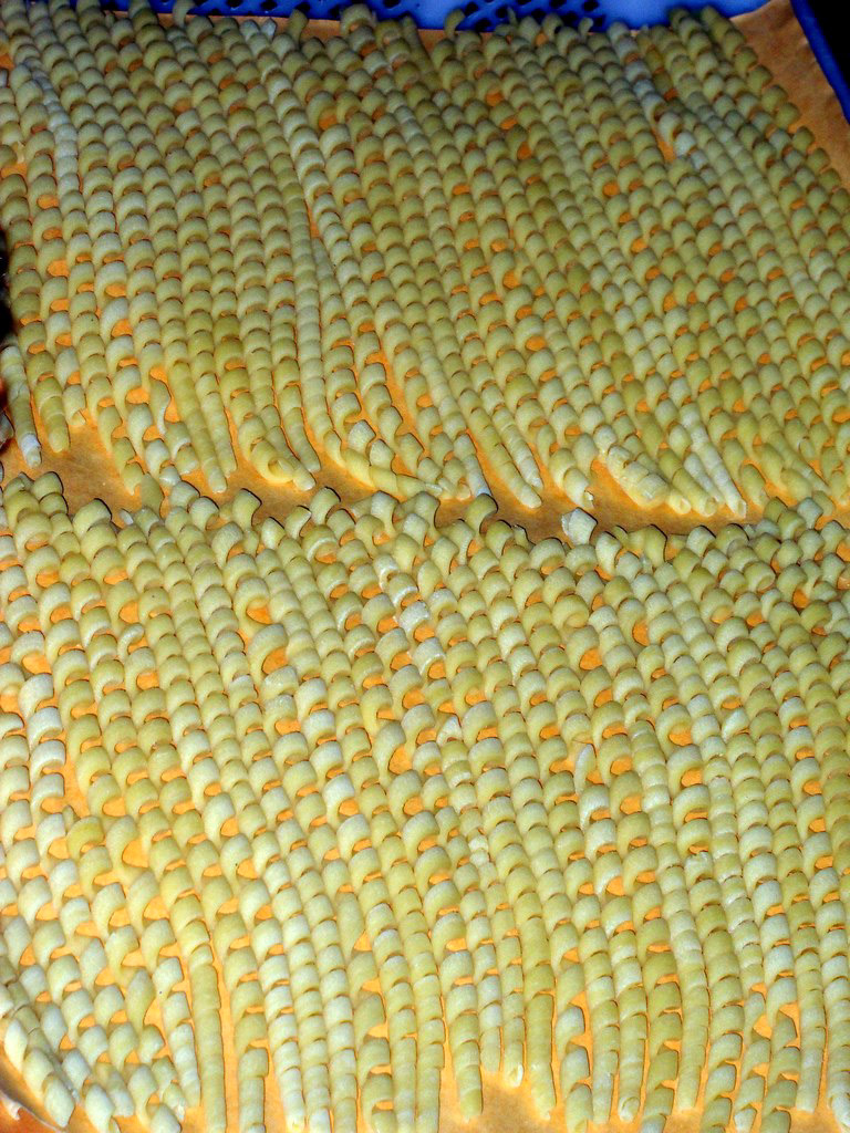 Fusilli di Gragnano anche chiamati fusilli di Capri (50 cm), lavorati a mano (Hand made), provincia di Napoli - Italia.